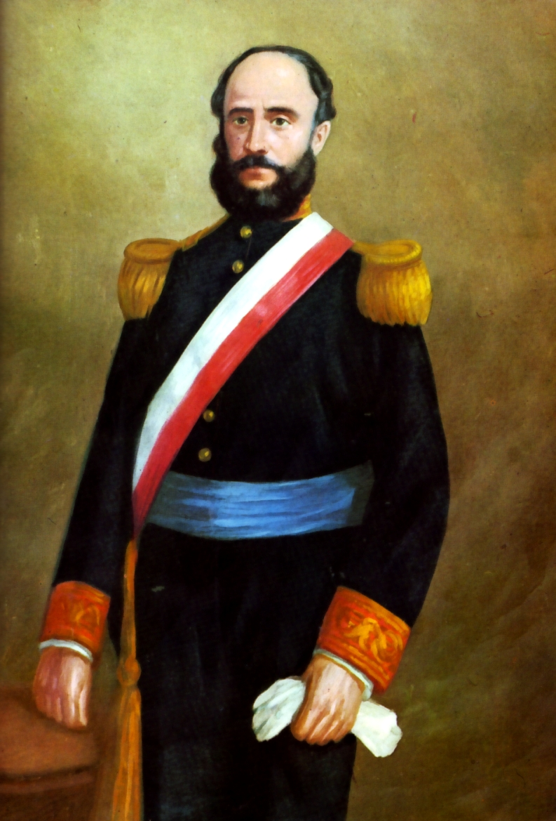 Pedro Diez Canseco (1815-1893), presidente provisorio del Perú en tres ocasiones.